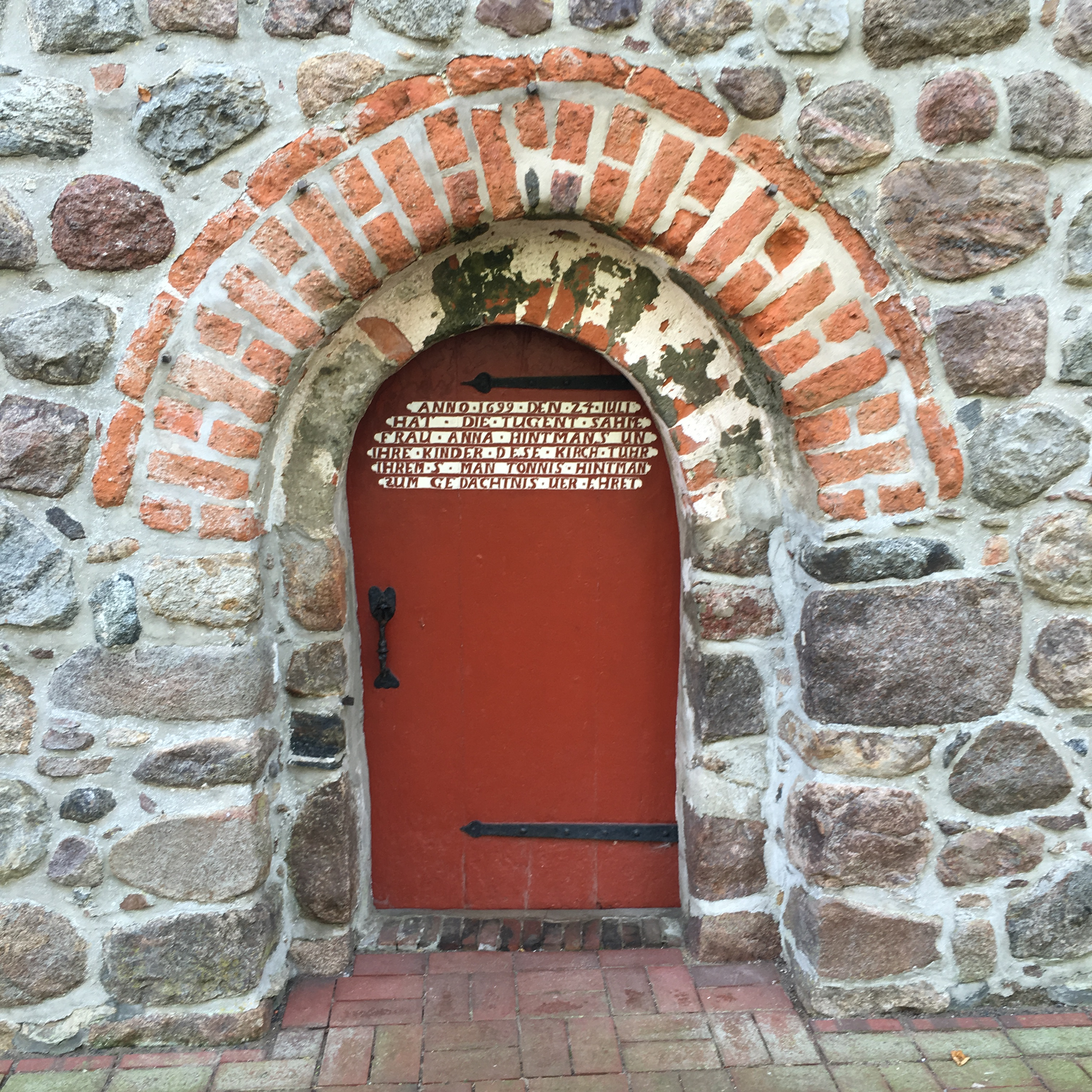 Döör von de Kark op de Host bi Burweg